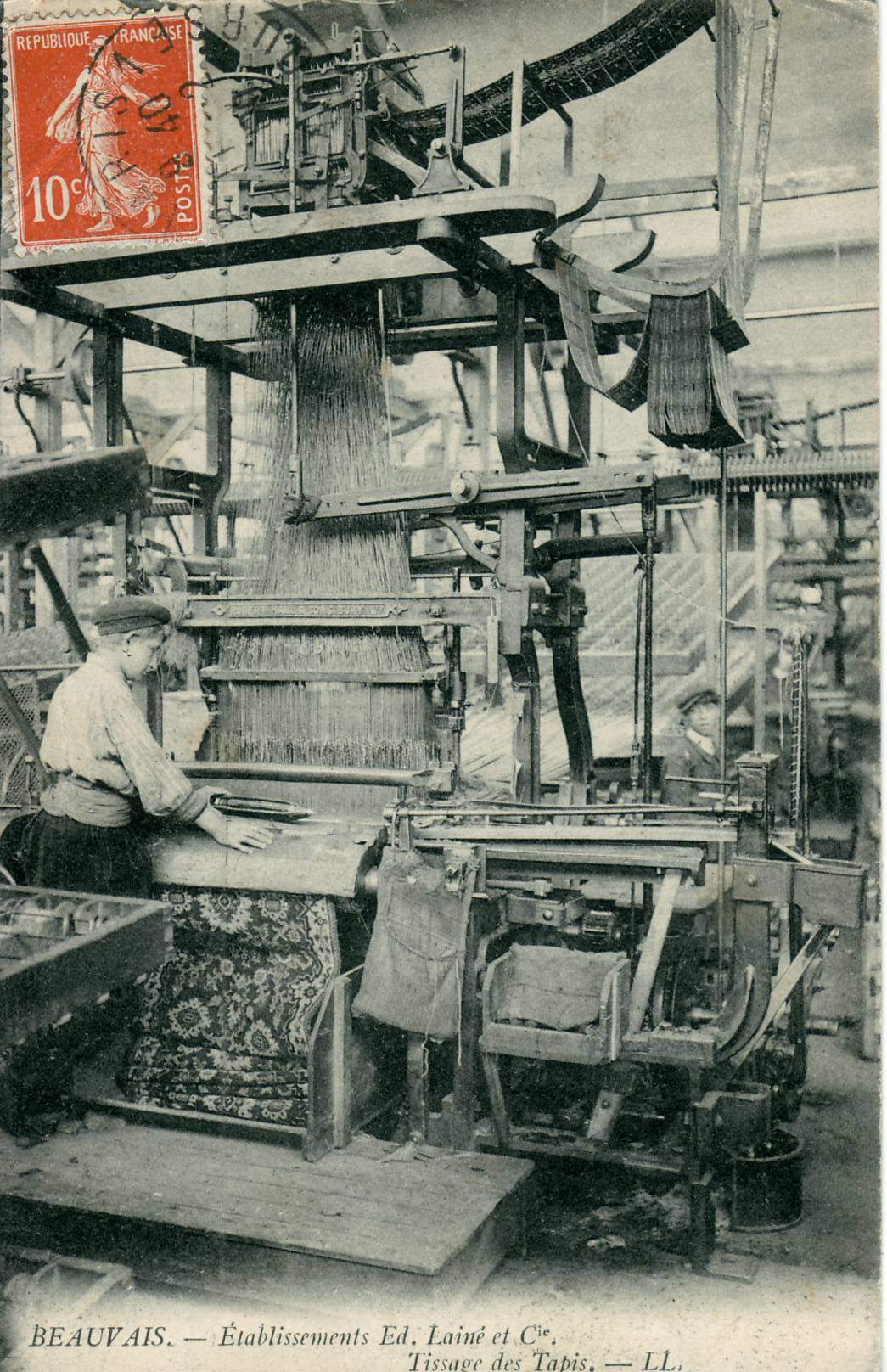 Carte postale ancienne éditée par LLBEAUVAIS : Établissements Ed. Lainé et Cie : Tissage des tapis